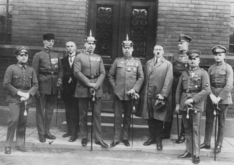 Zu der Urteilssprechung im Hitler-Ludendorf-Prozess in München am 1. April 1924. Die einzige Aufnahme sämtlicher Angeklagten im Hitler-Ludendorf-Prozess nach dem Urteilsspruch. Die Gruppenaufnahme gelang unter den schwierigsten Verhältnissen. Von links nach rechts: [Heinz] Pernet, Dr. [Friedrich] Weber, [Wilhelm] Frick, Oberleutnant Griebel [= Hermann Kriebel], [Erich] Ludendorff, [Adolf] Hitler, [Wilhelm] Brückner, [Ernst] Röhm, [Robert] Wagner.